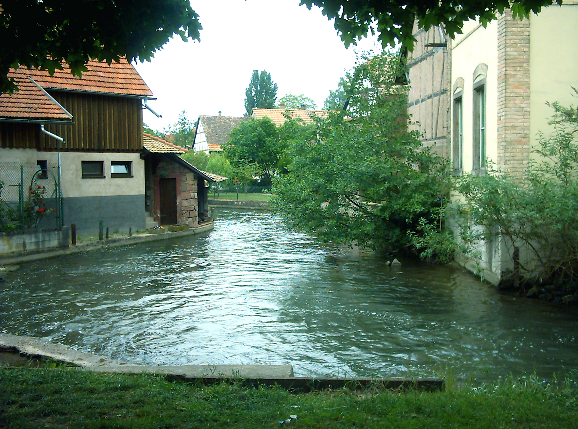 Erstein (France), bras de l'Ill